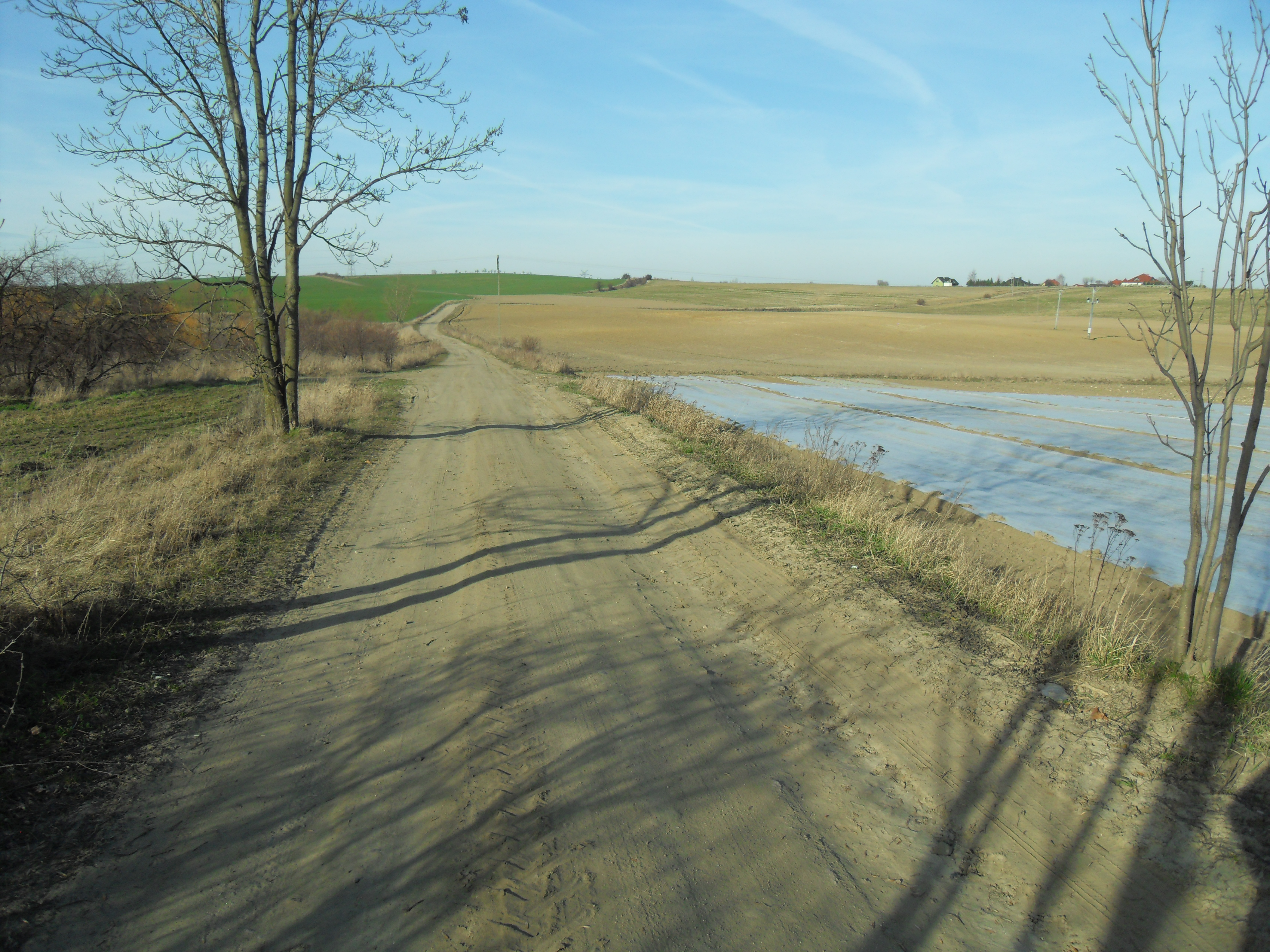 Gdańsk Rotmanka.